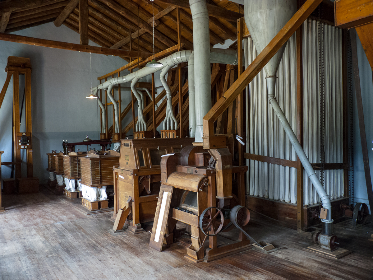 Fábrica de harinas La Dolores, Caldearenas, Huesca, España